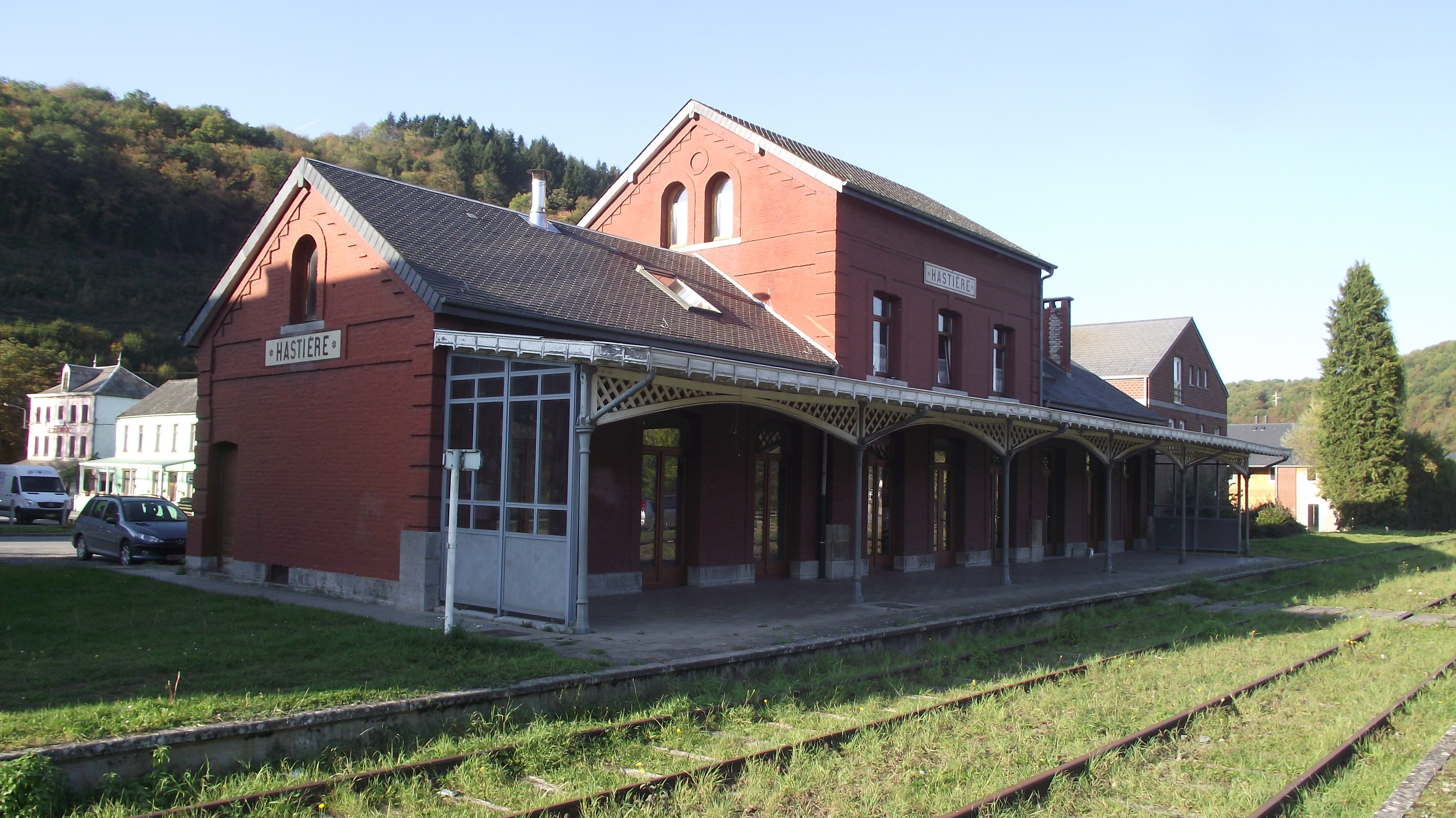 Ex-station van Hastiere. Gebouw is in gebruik, maar niet bewoond.